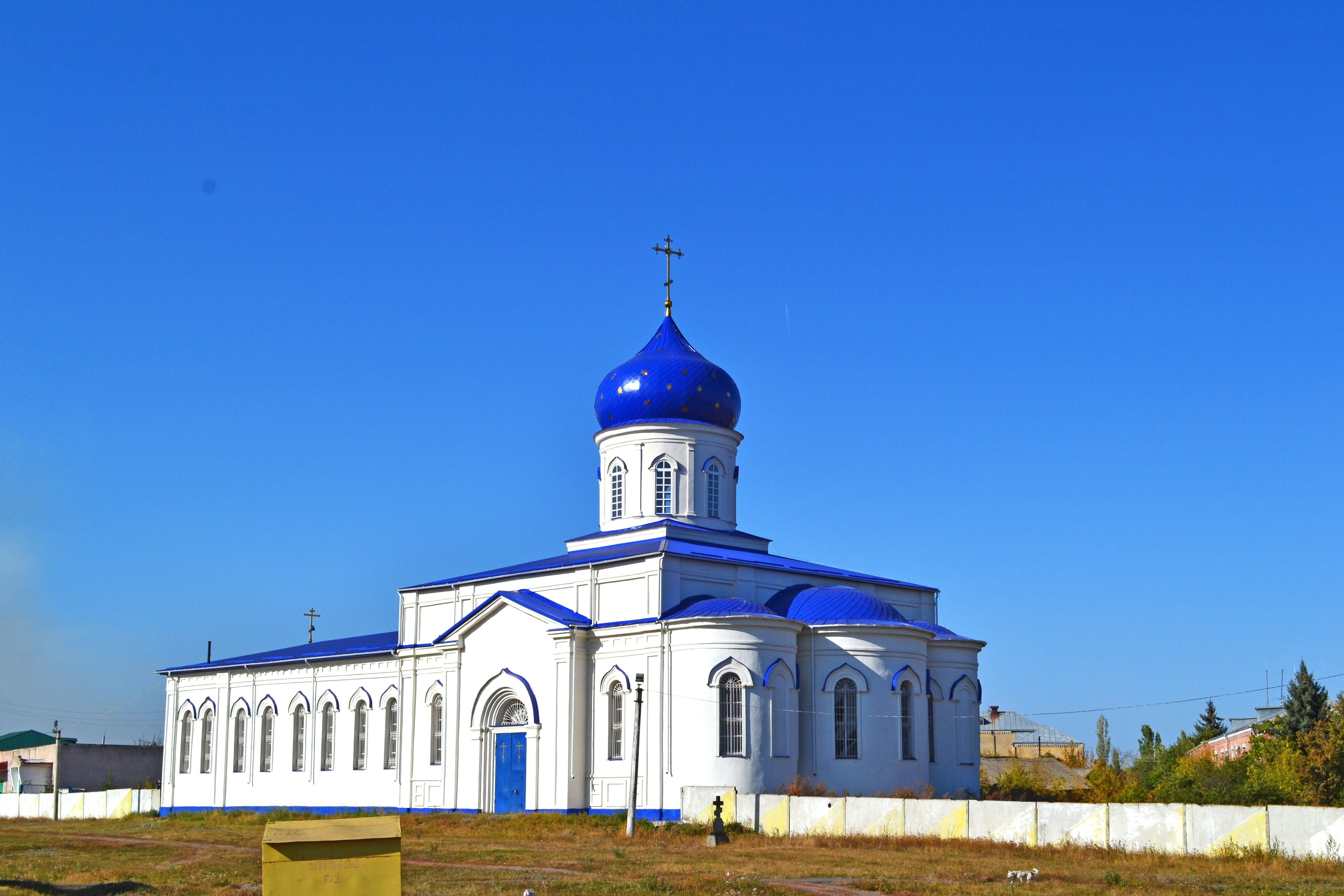 Крестовоздвиженская церковь: Заречное, Бутурлиновский район, Воронежская область